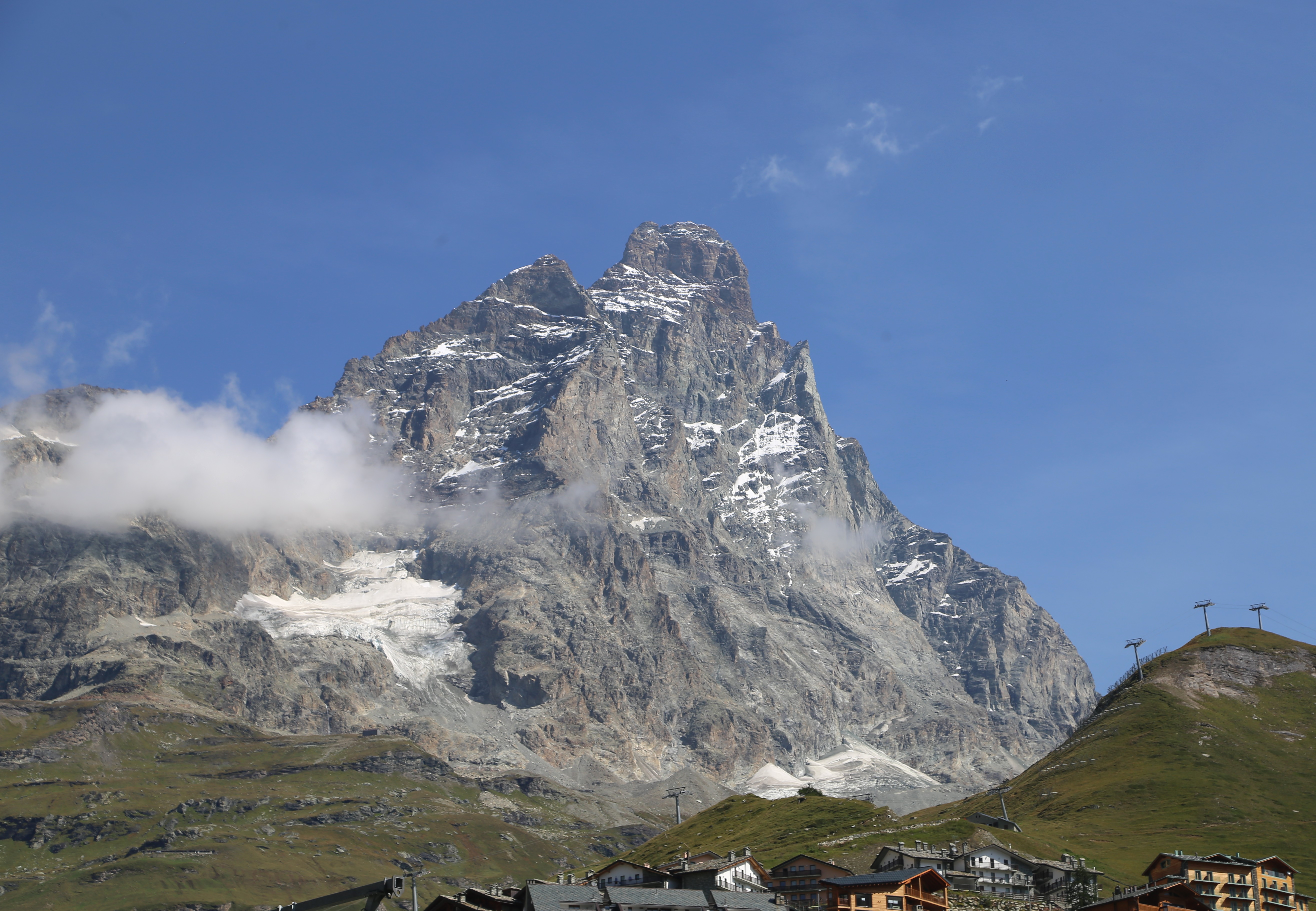 Matterhorn von Breuil-Cervinia gesehen, Aostatal